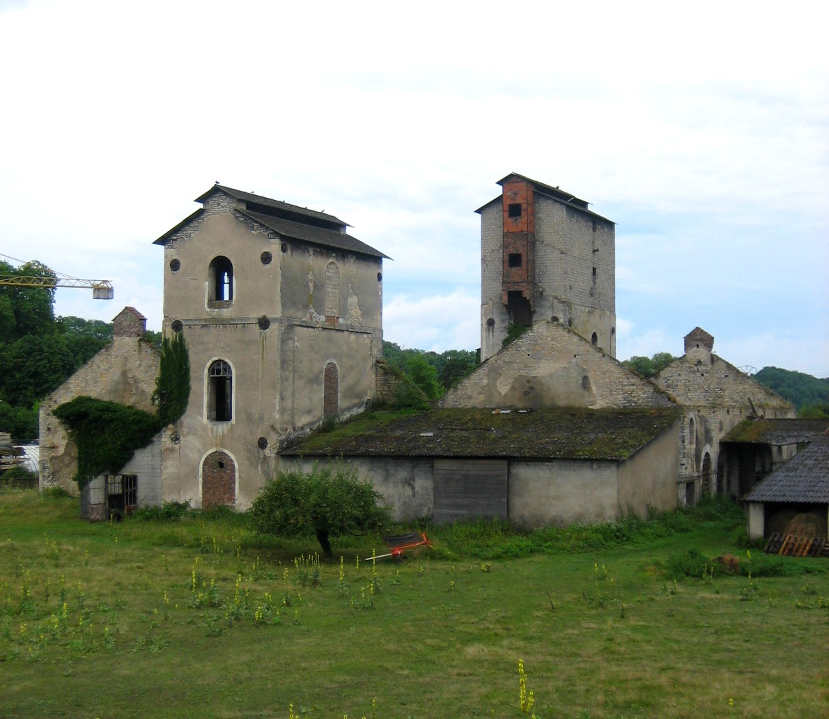 Forges de Rans, Jura, France